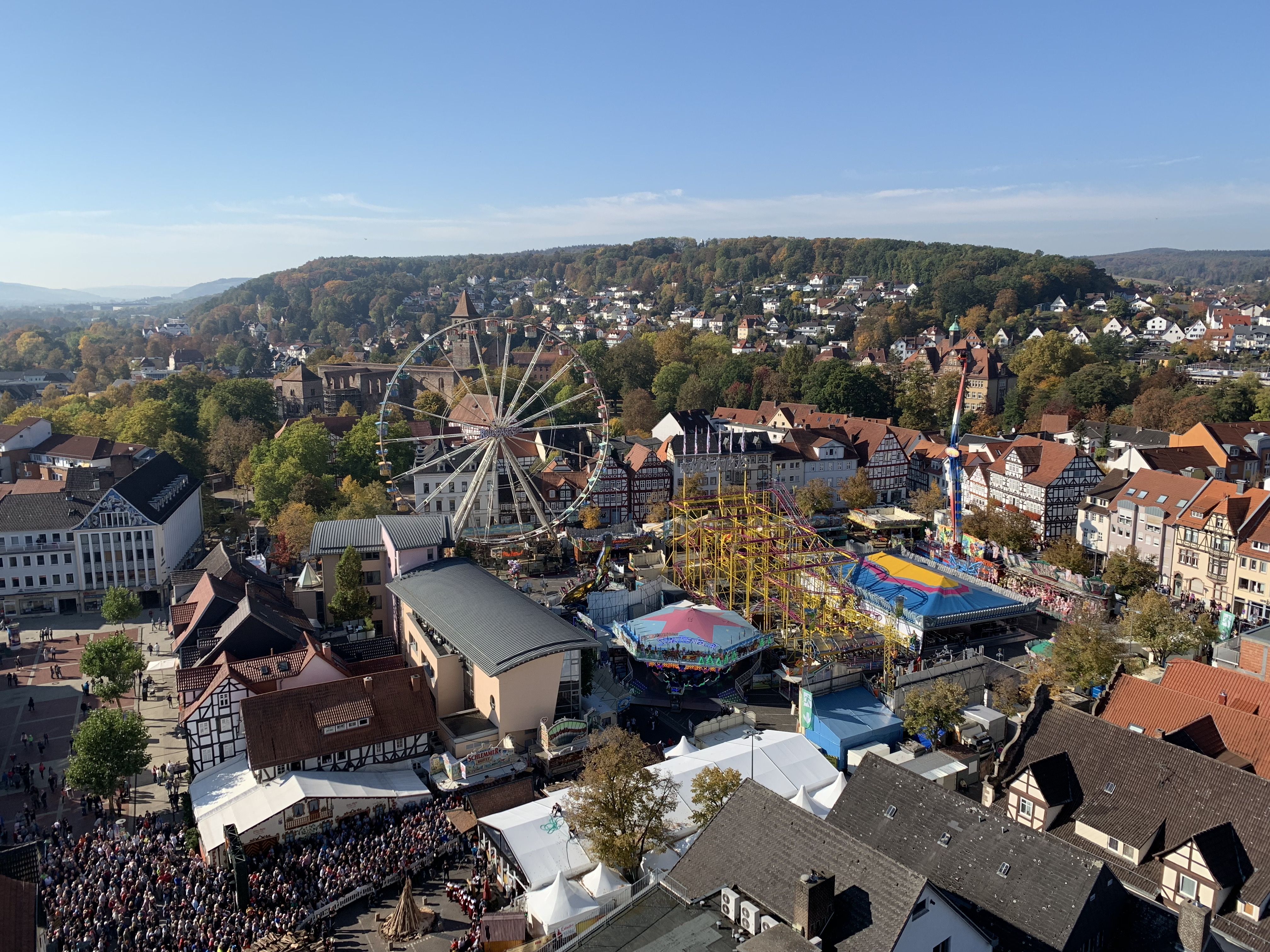 Lullusfest 2018, vom Kirchturm aus aufgenommen